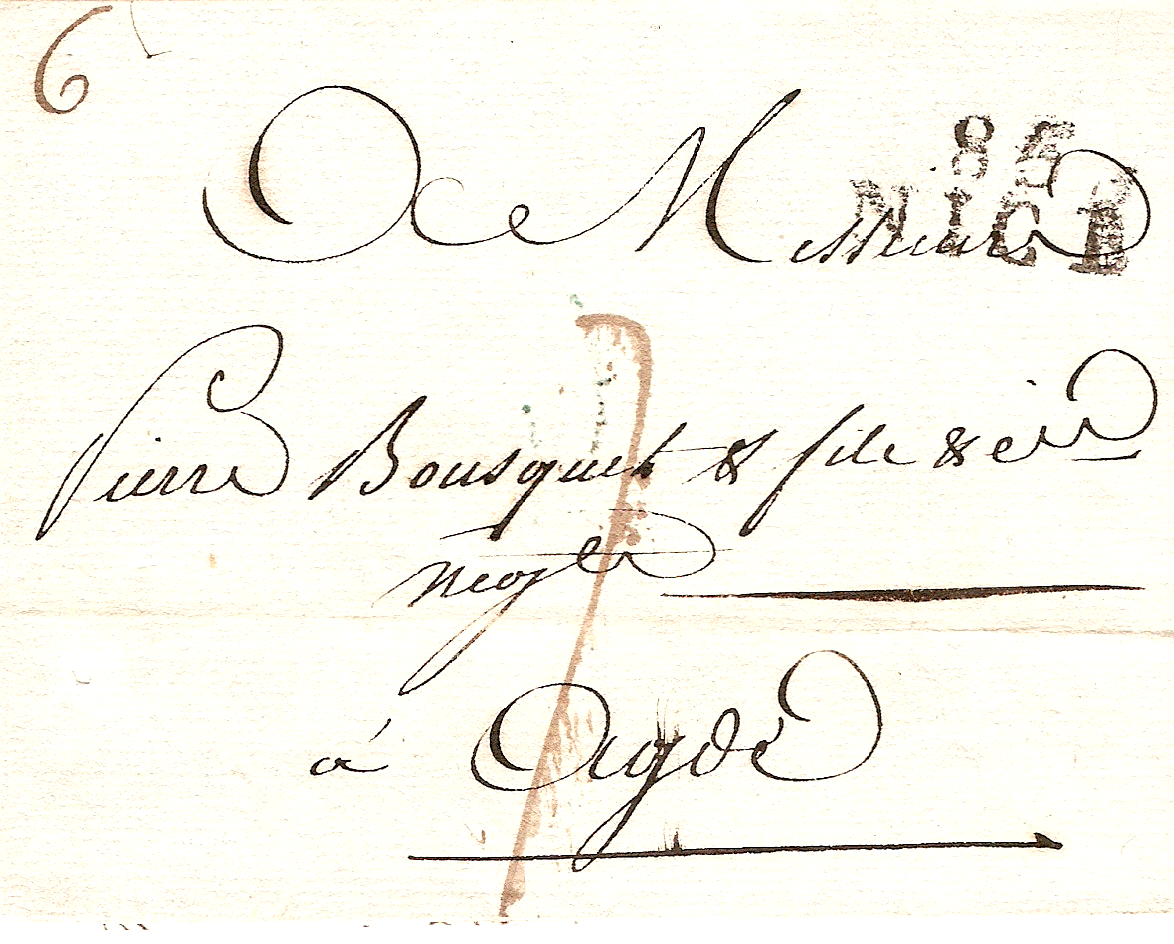 Lettre de Nice du 25 brumaire, an 12